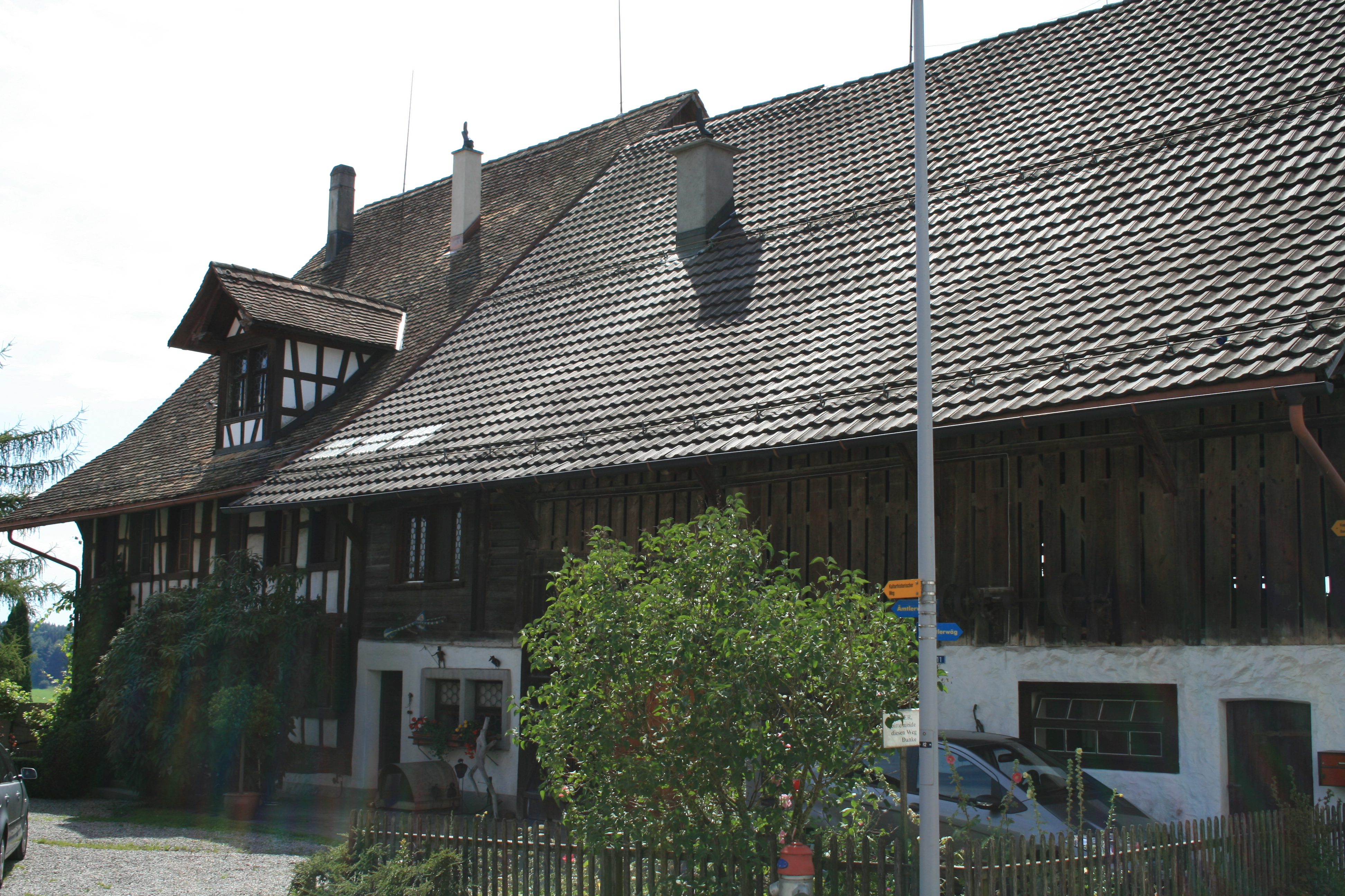 Näfenhaus: links Haus-Nr. 13, rechts Nr. 11, Kappel am Albis, Schweiz